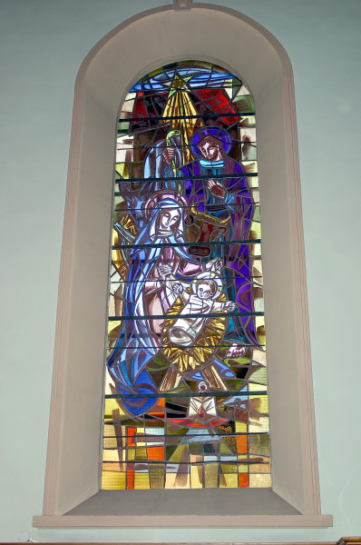 Walschbronn